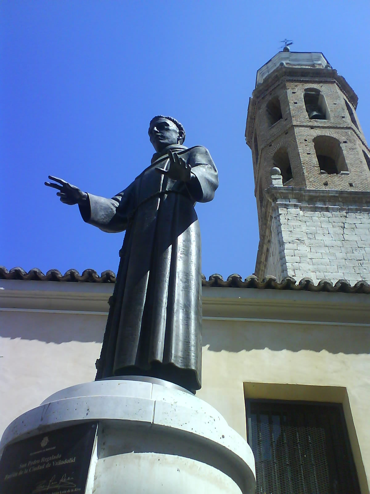 Estatua de San Pedro Regalado en la Plaza de El Salvador de Valladolid, con la torre de la iglesia de El Salvador al fondo.